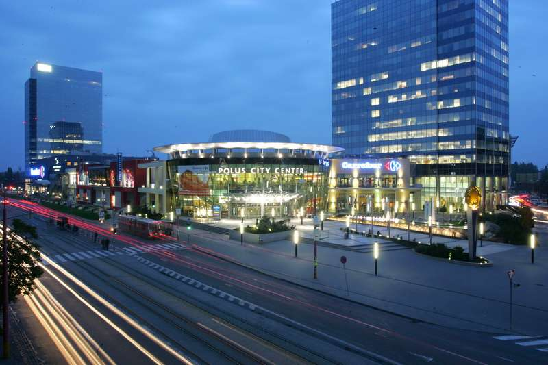 Markus